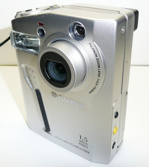 Fujifilm Fine Pix 1700Z.